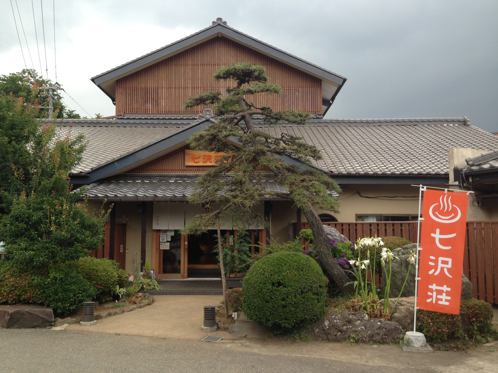 神奈川県厚木市の七沢温泉郷にある旅館「七沢荘」。日帰り温泉も実施している。